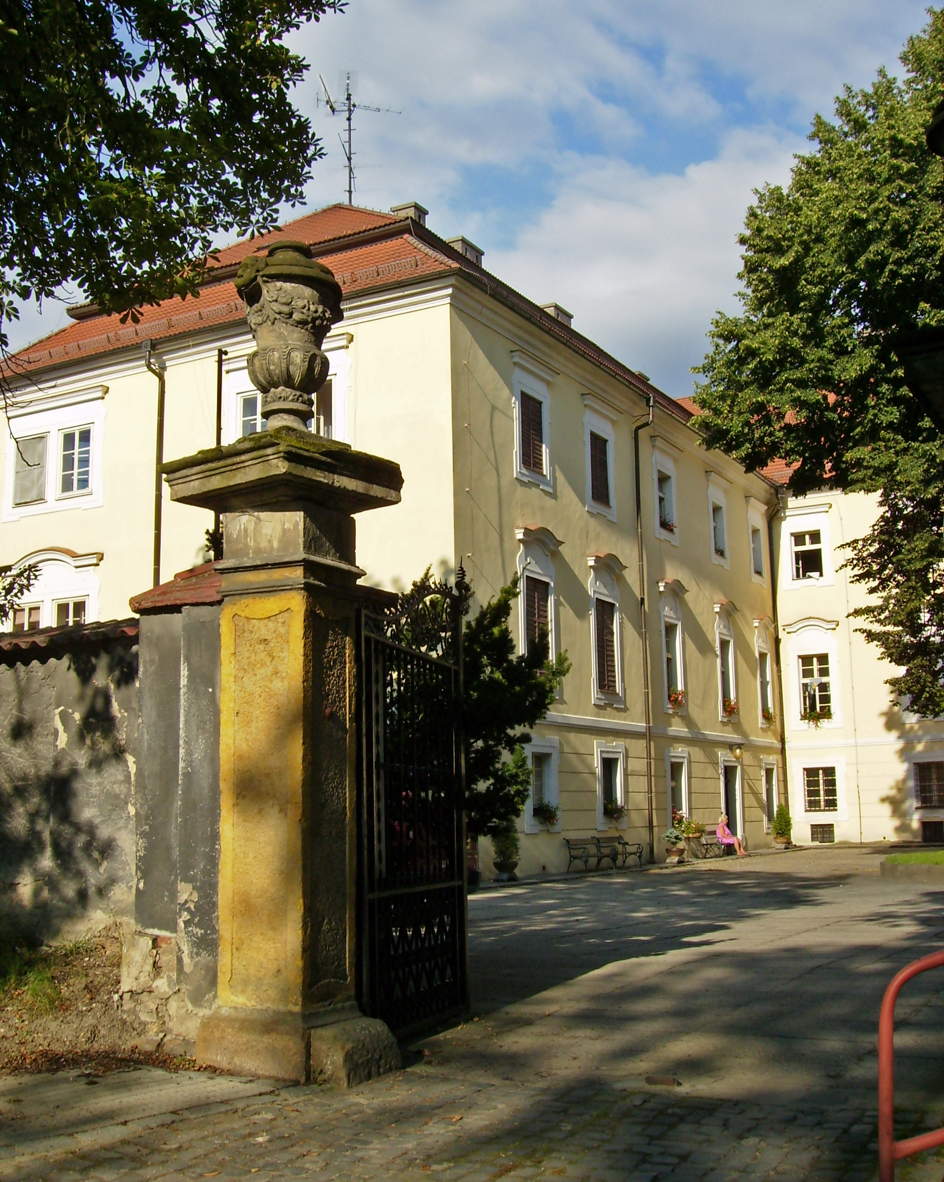 Zámek v Rožďalovicích na Nymbursku.